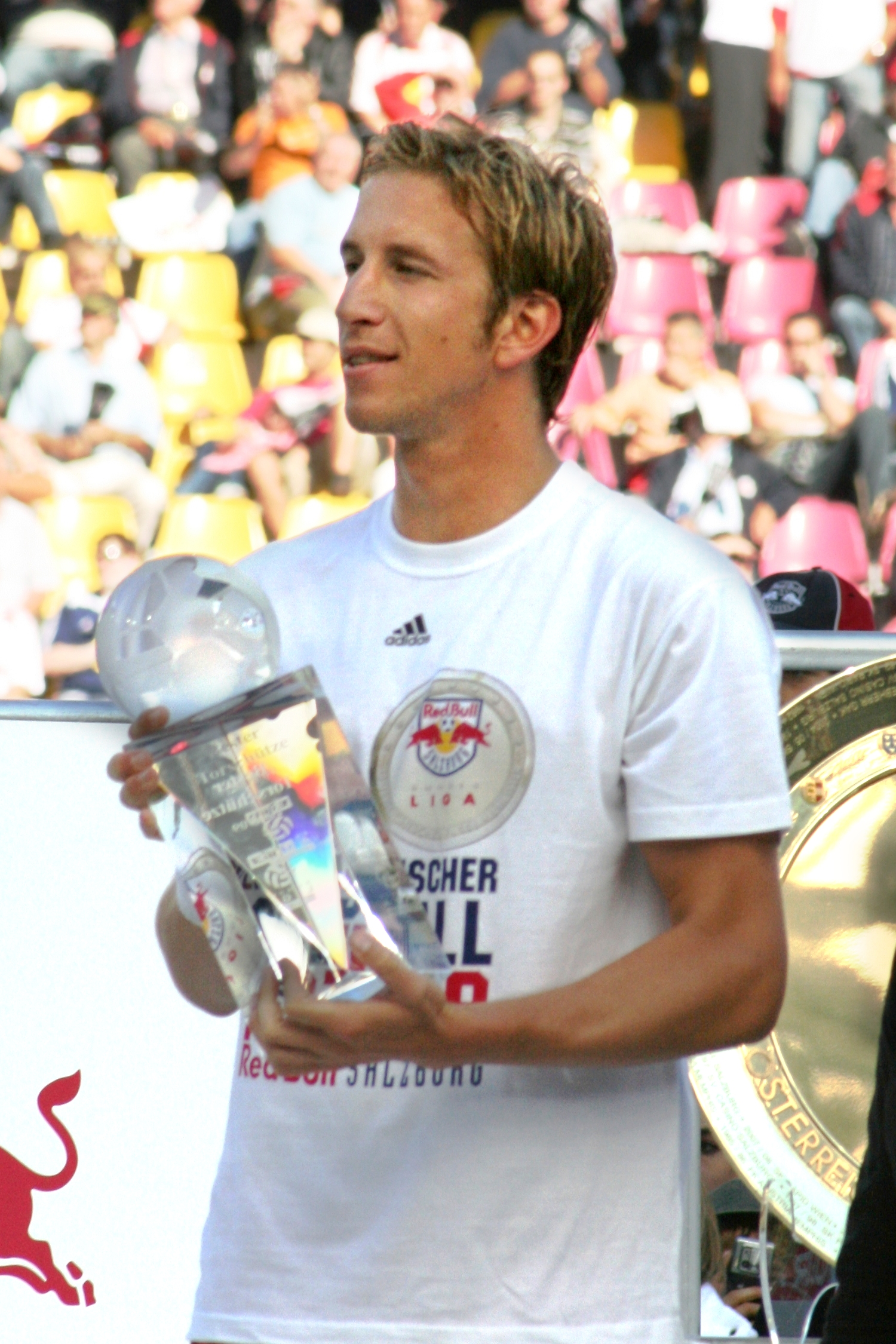 Marc Janko, Torschützenkönig der österreichischen Bundesliga in der Saison 2008/09